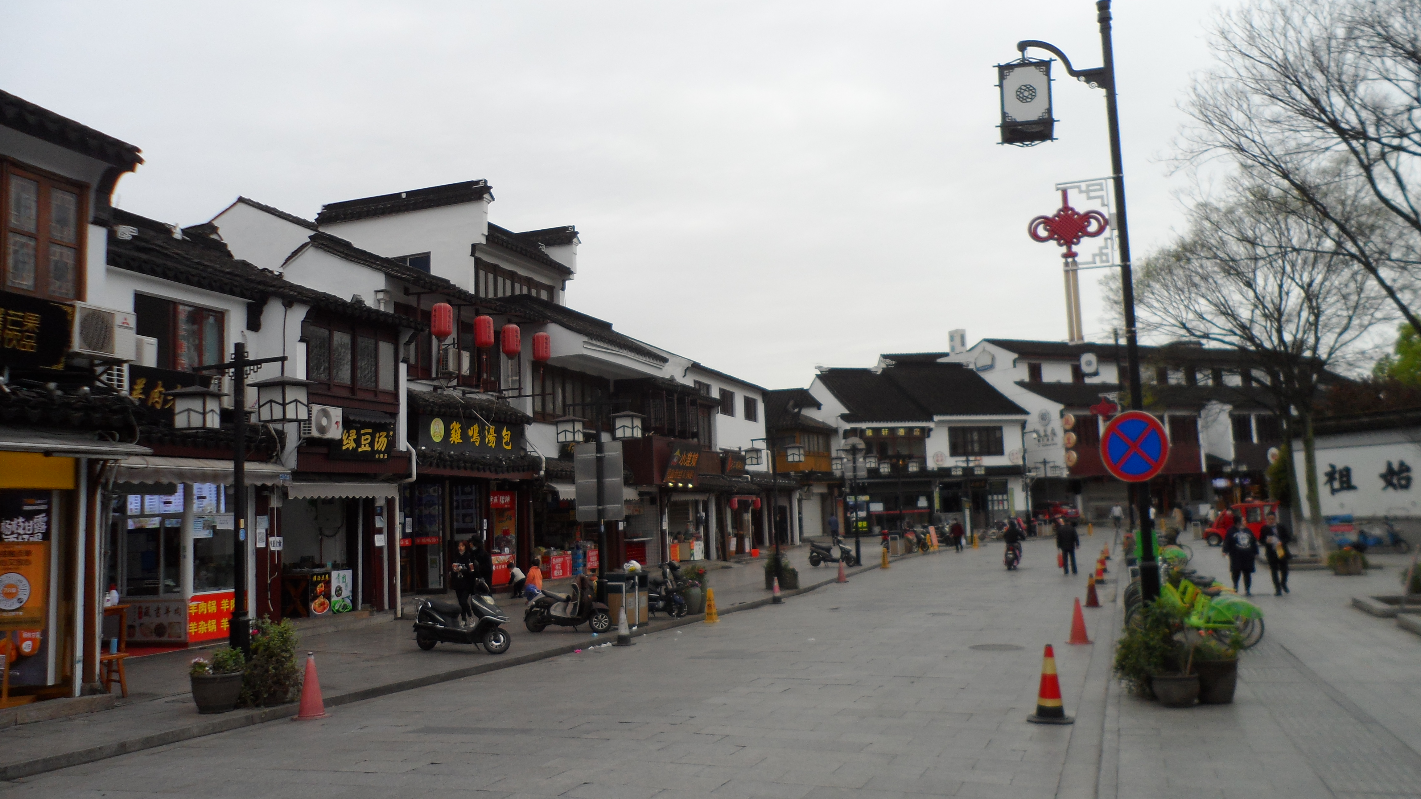 Chang Men Historic Street